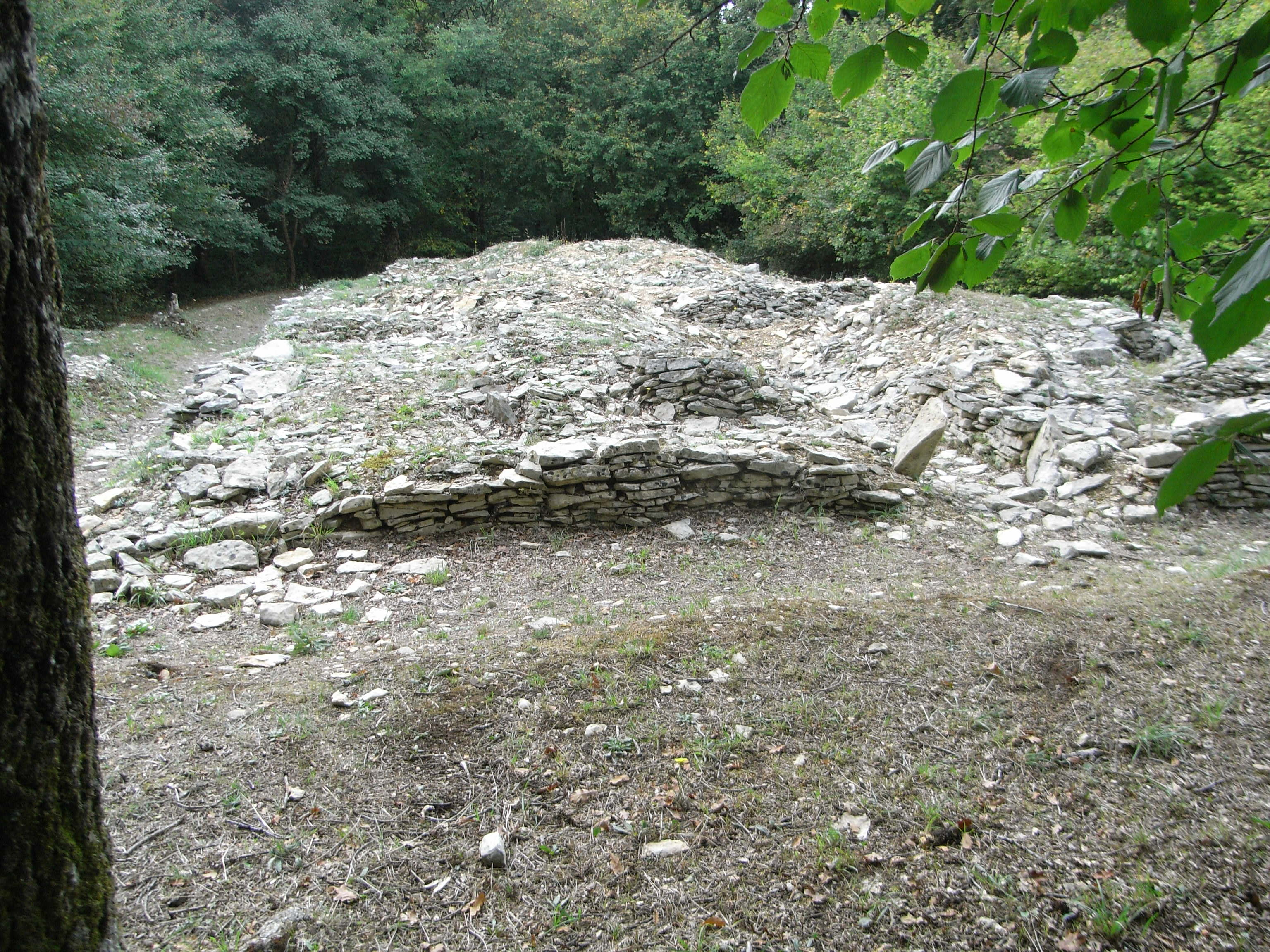 Tumulus de Champ Châlons (forêt de Benon) à Benon en Charente-Maritime (France).